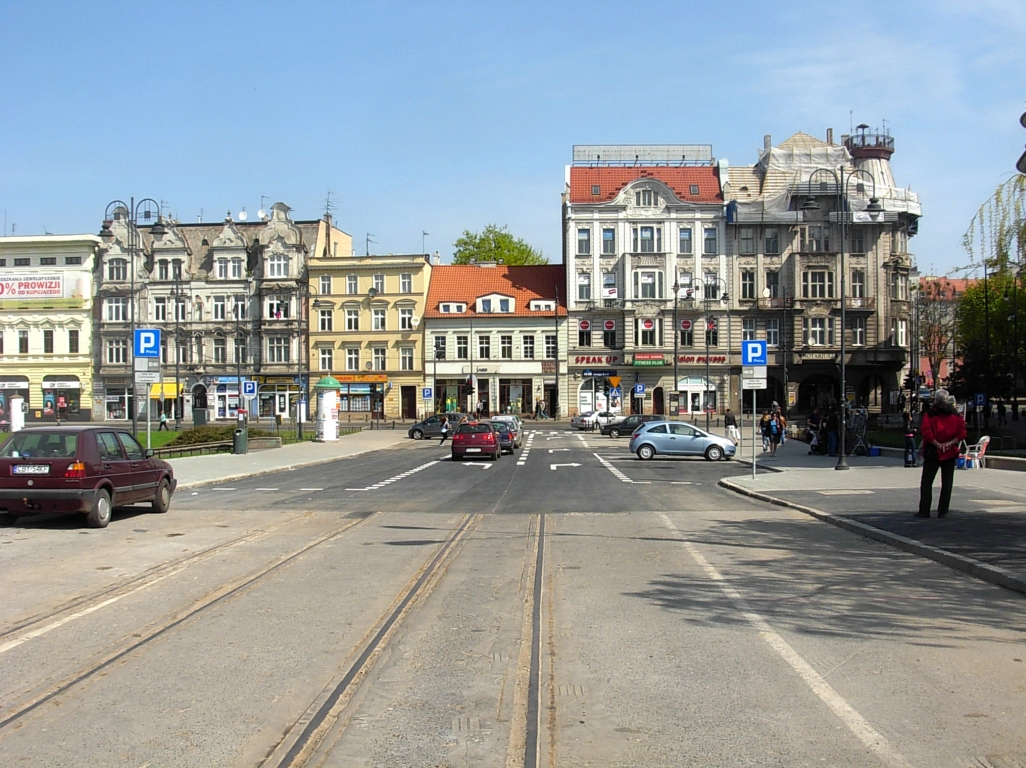 Ulica Mostowa w Bydgoszczy